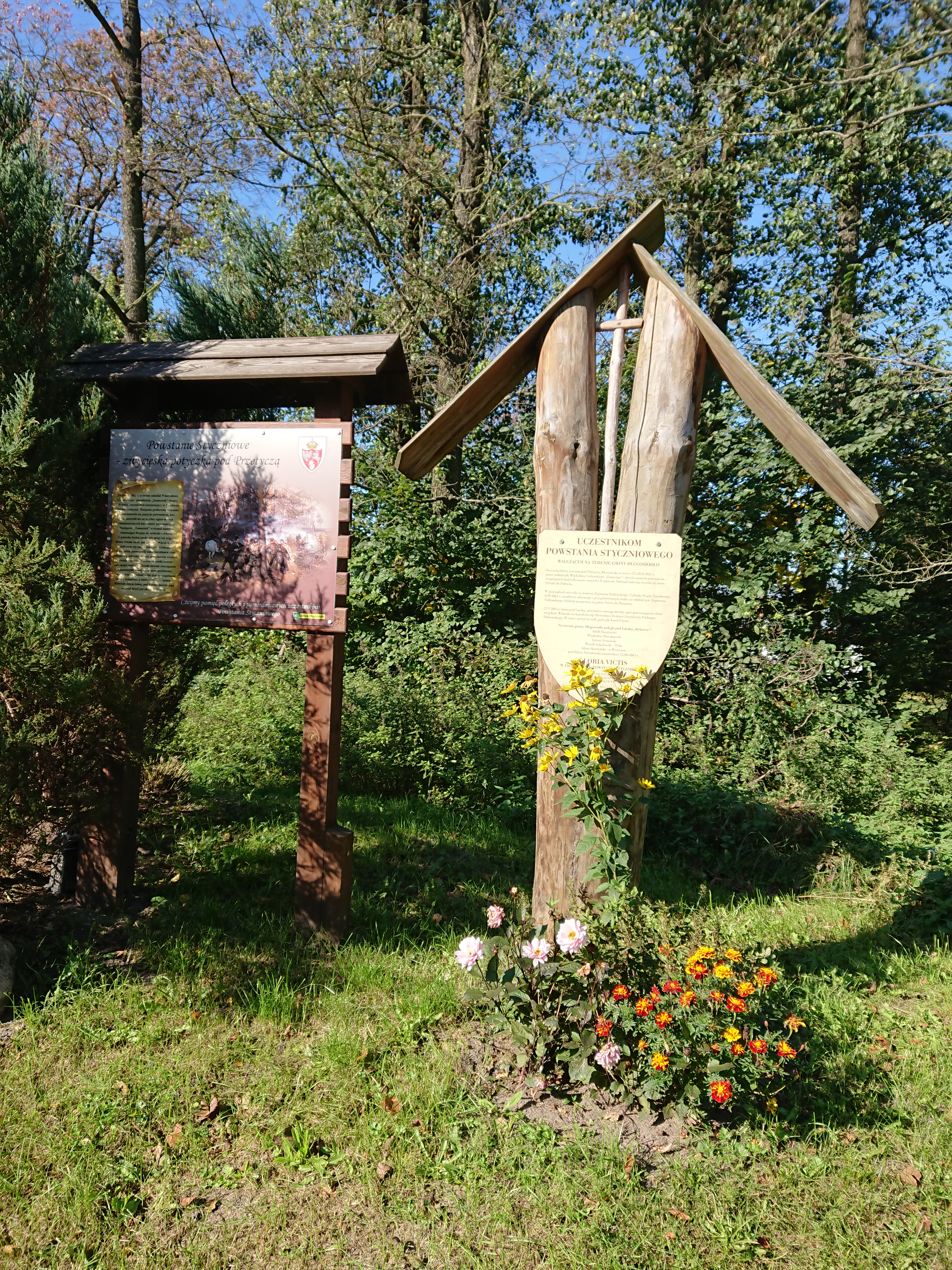 Miejce pamięci bohaterów powstania styczniowego w Przetyczy